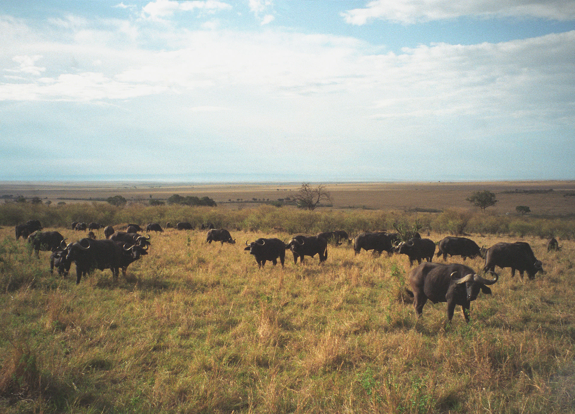 African Buffalos, Masai Mara, Kenya